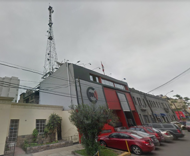 Esta es la nueva casa del IRTP